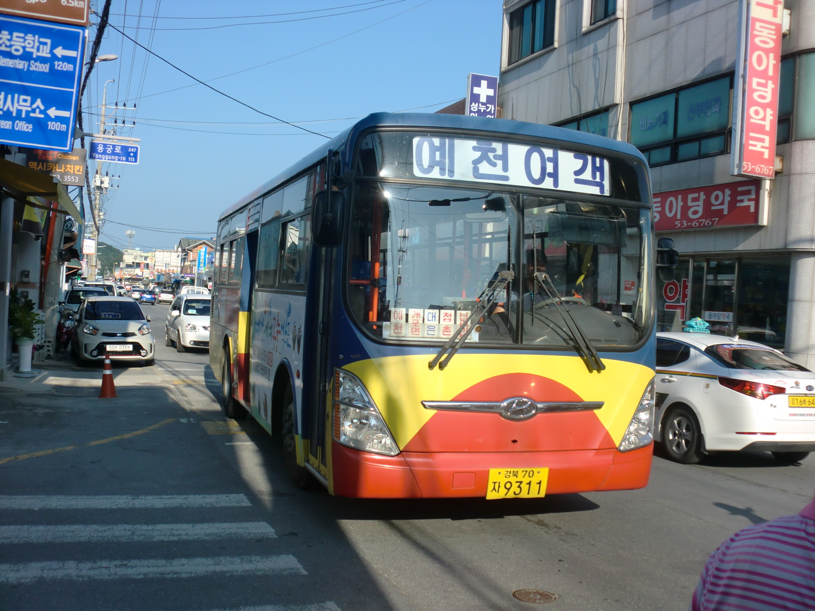 예천군내버스